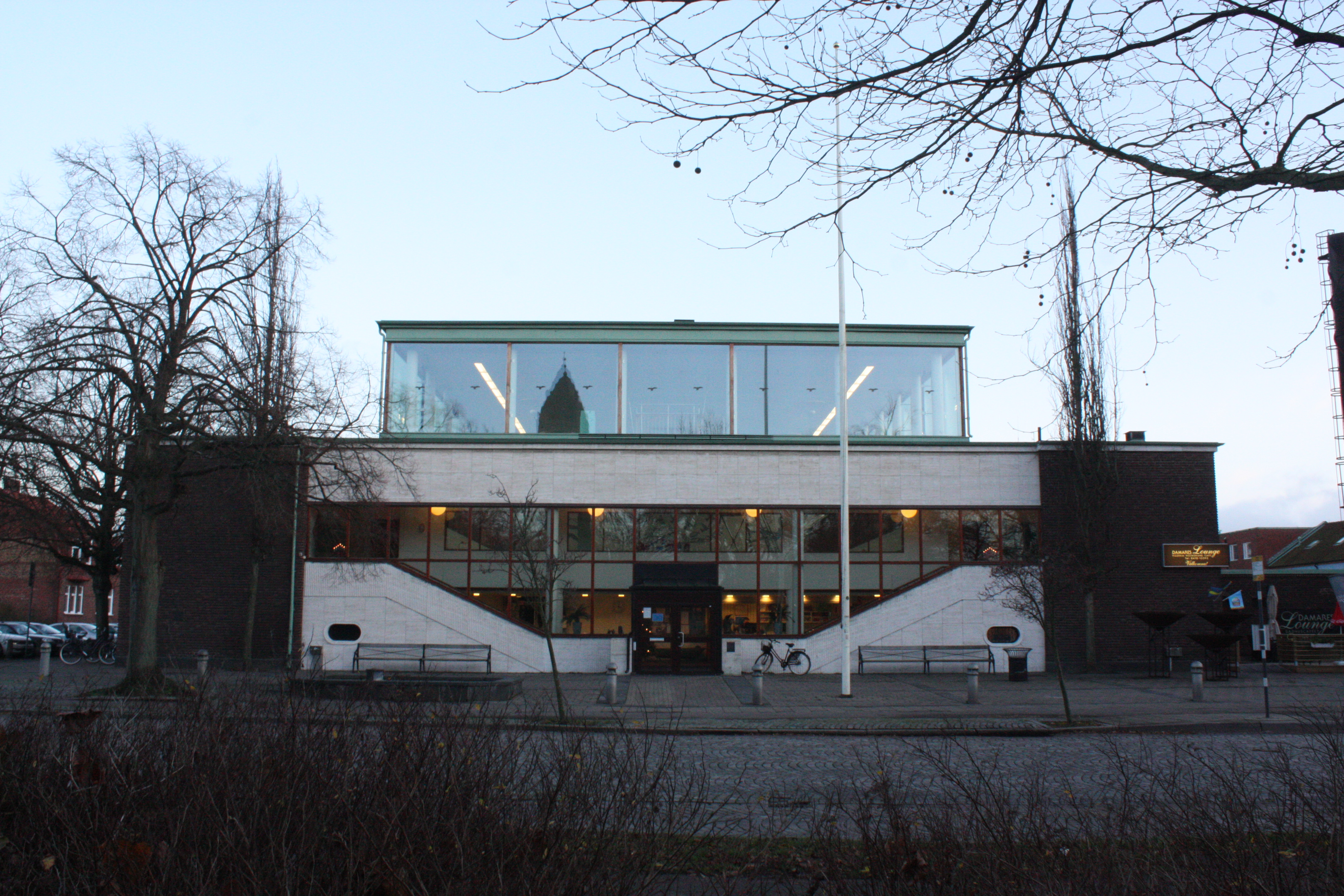 Casa de banho termal (Badhus)